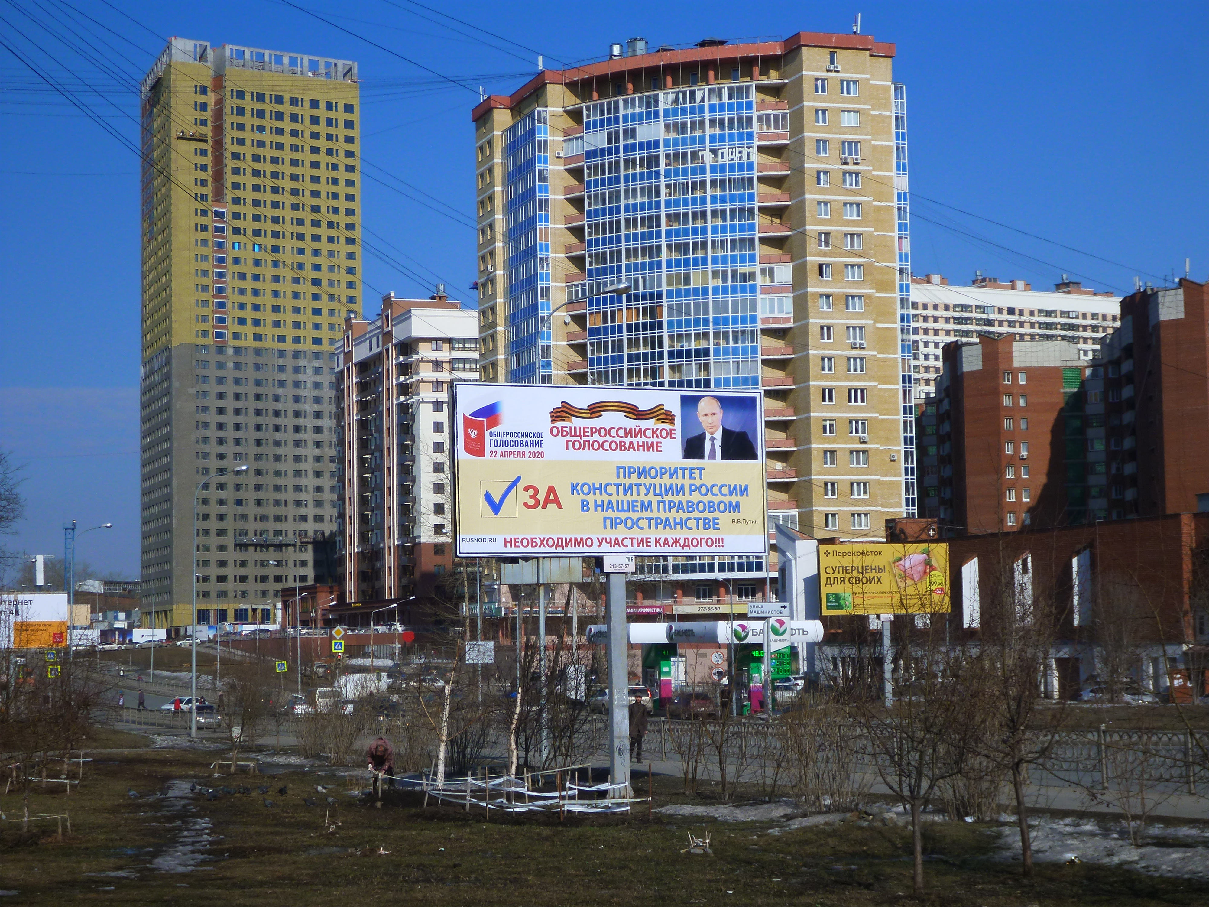 Щит НОД за поправки к конституции. Екатеринбург 24 марта 2020 года